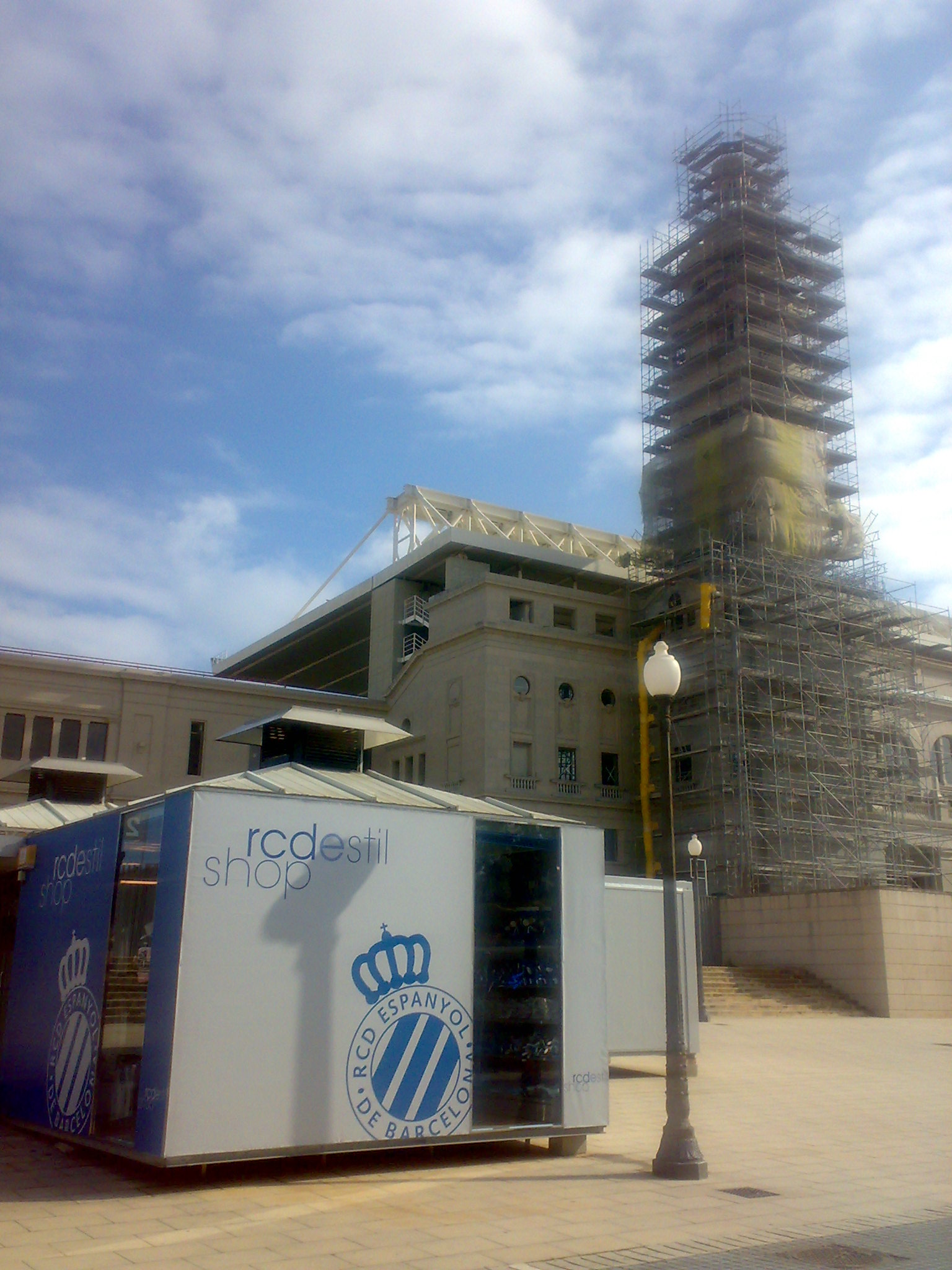 Espanyol Stadium Barcelona